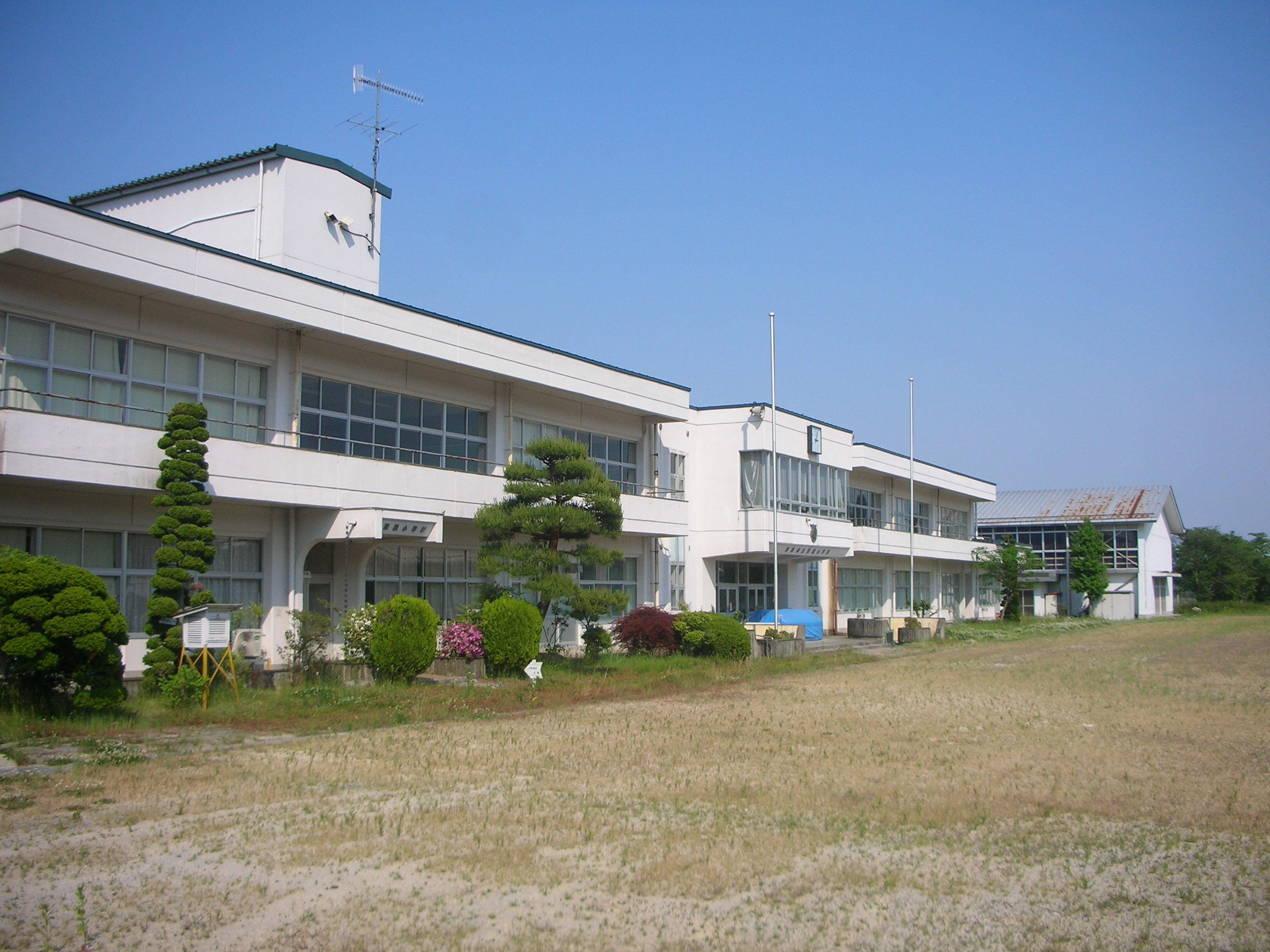 栗原市立姫松小学校 2015.5.25